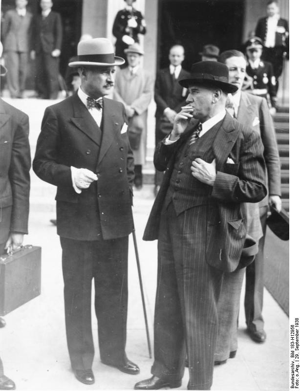 Scherl: Historische Stunden in München Ministerpräsident Daldier und der französische Botschafter Francois Poncet beim Verlassen des Führerbaus nach der ersten Besprechung. 29.9.38